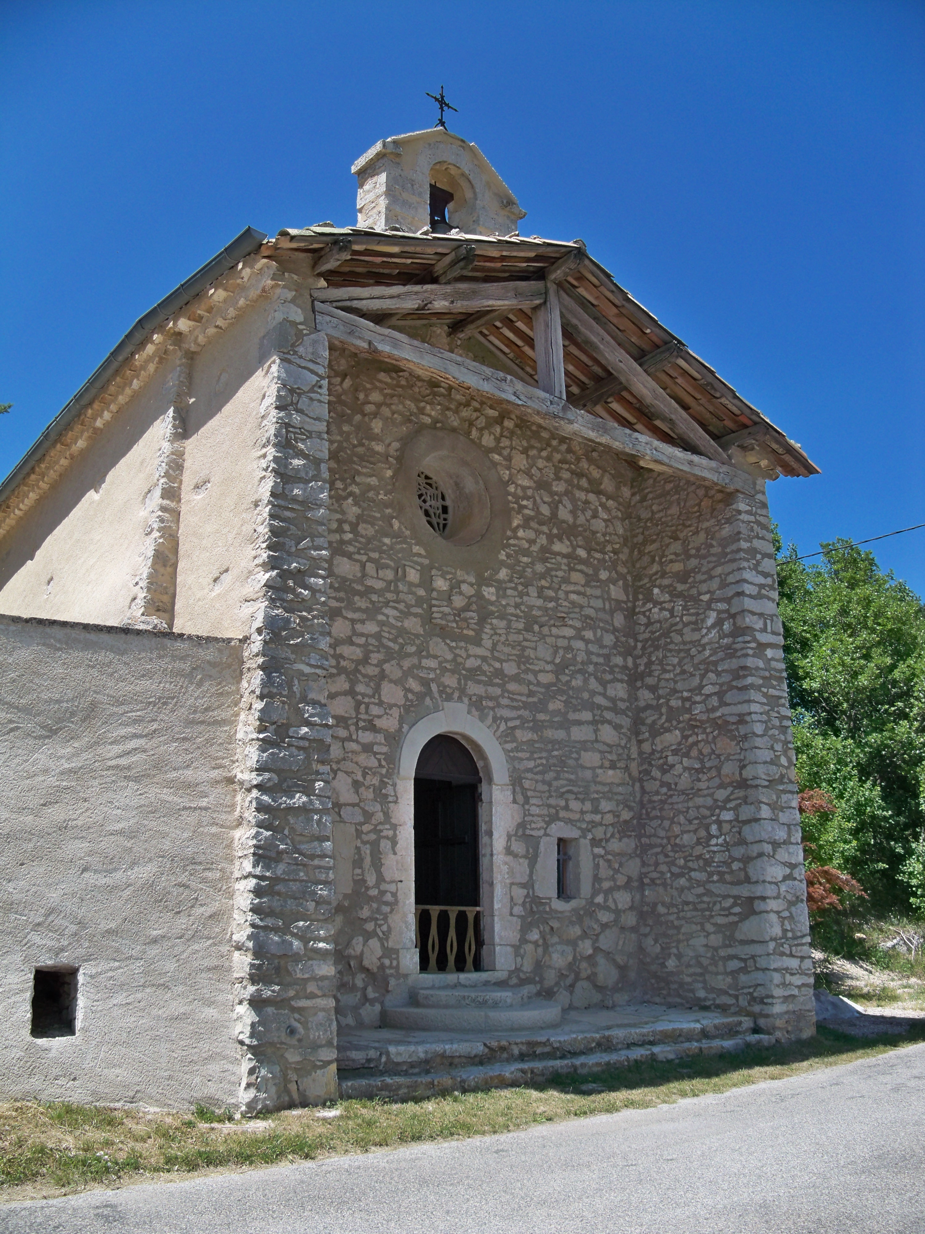 église Saint Jean Baptist de Redortiers (04)